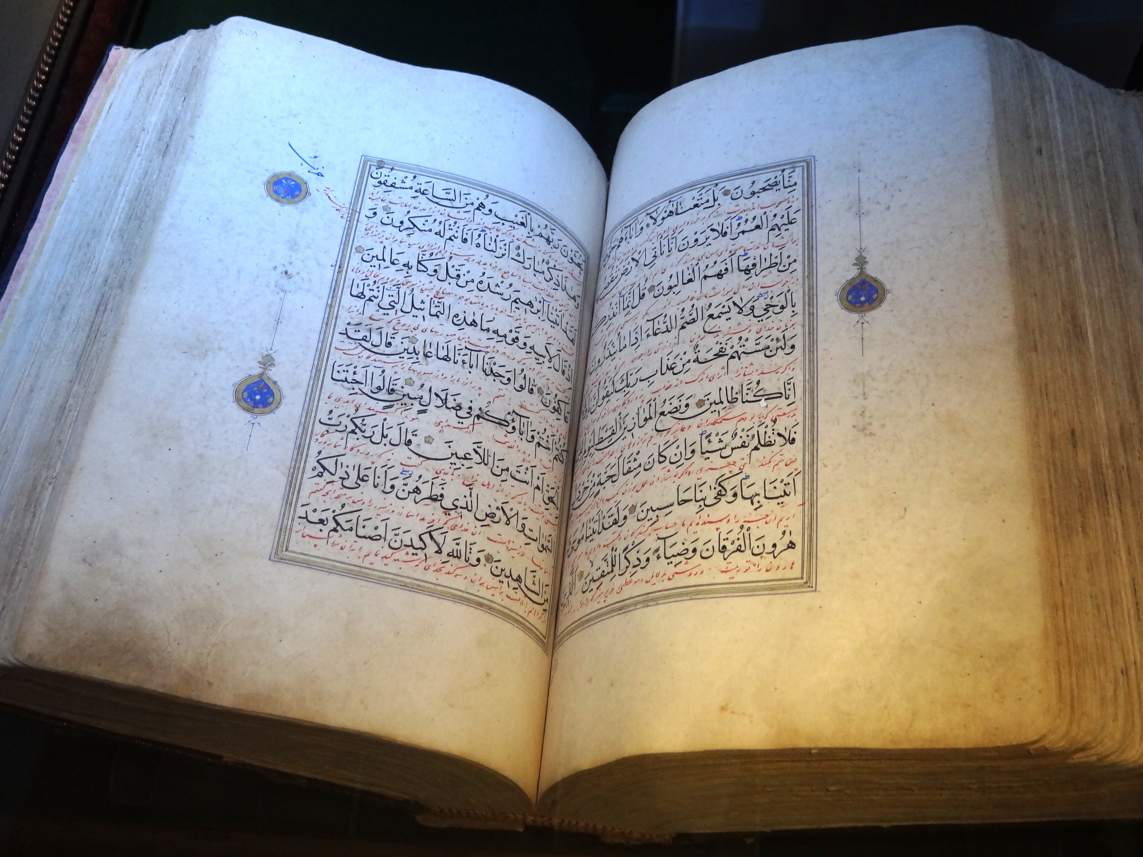 Medieval Koran - In Chini-Khaneh Hall - Sheikh Safi Mausoleum - Ardabil - Iranian Azerbaijan - Iran